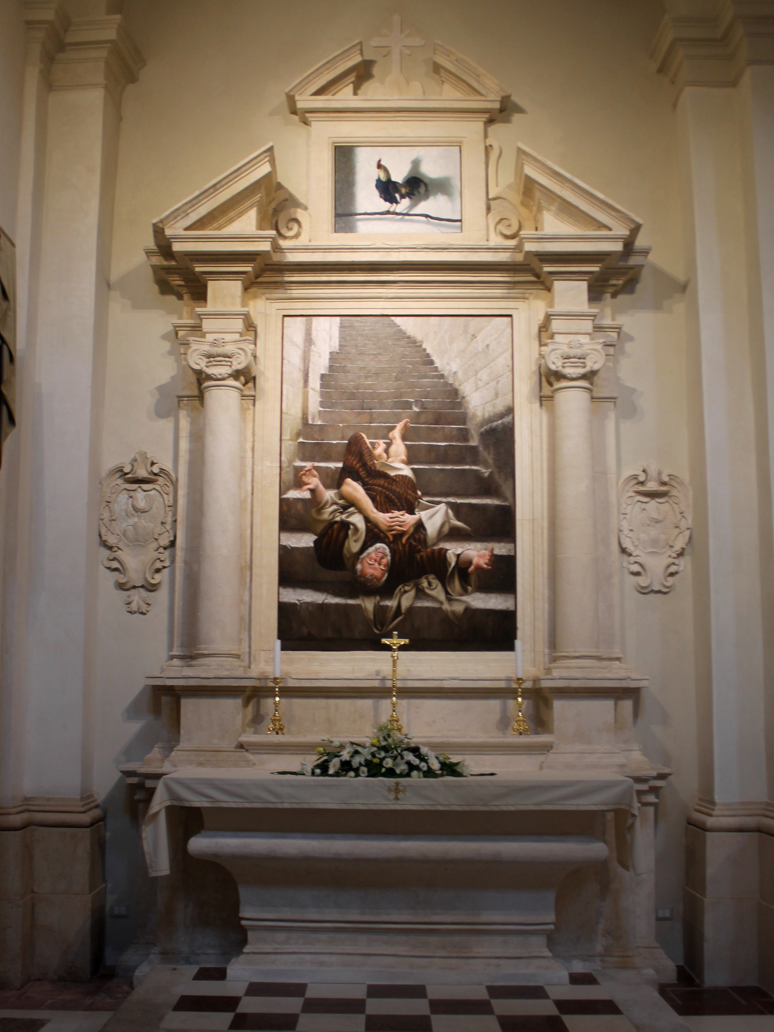 Interno della chiesa di San Biagio in L'Aquila: particolare del "Pentimento di San Pietro", olio su tela, 207 X 142 cm, ad opera di Giovanni Gasparro